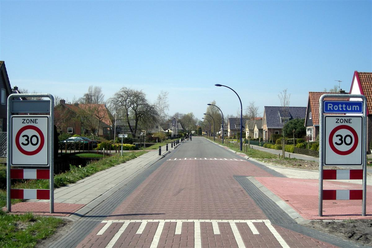 Rottum (Friesland)